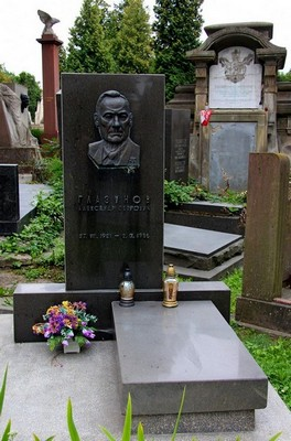 Надгробок на могилі О.Глазунова.Личаківський цвинтар , поле № 1.